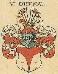 Duhna Wappen